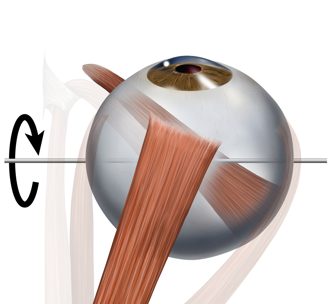 Eye movements elevators